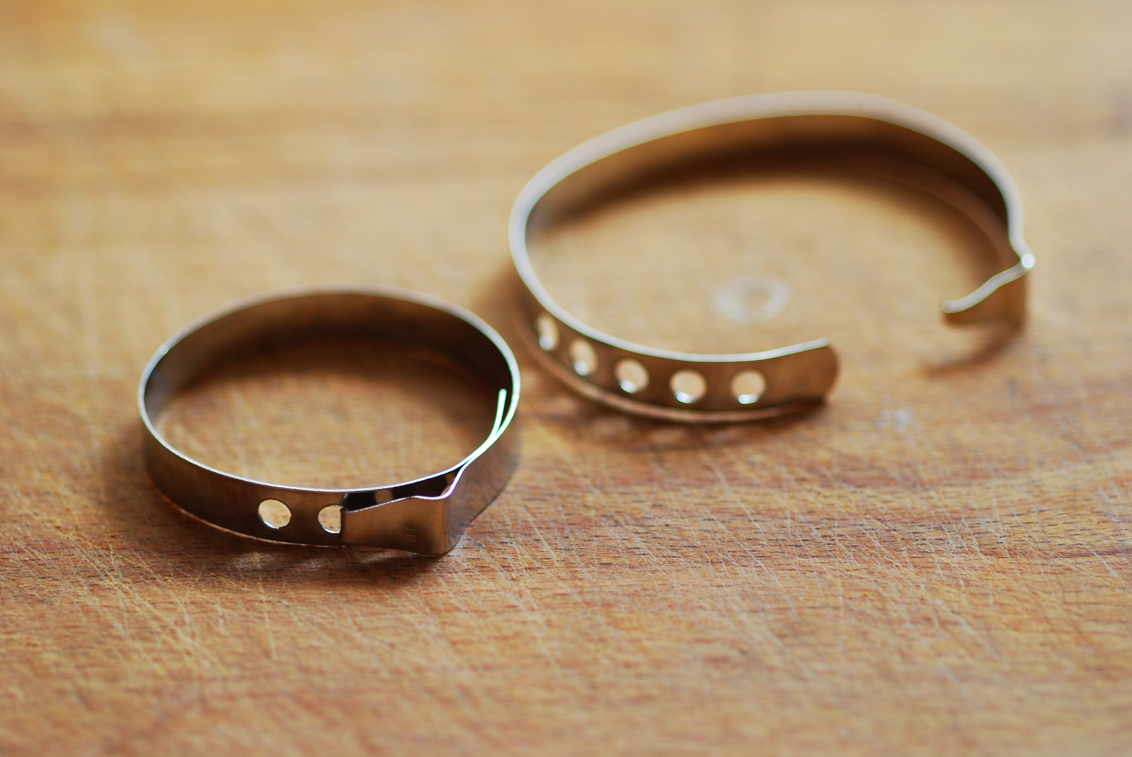 Quelle: D. Albert (Benutzer:User:Dial, eigenes Foto) Beschreibung: Offene und geschlossene Rouladenklammern. Autor: D. Albert Date: Mai 2008